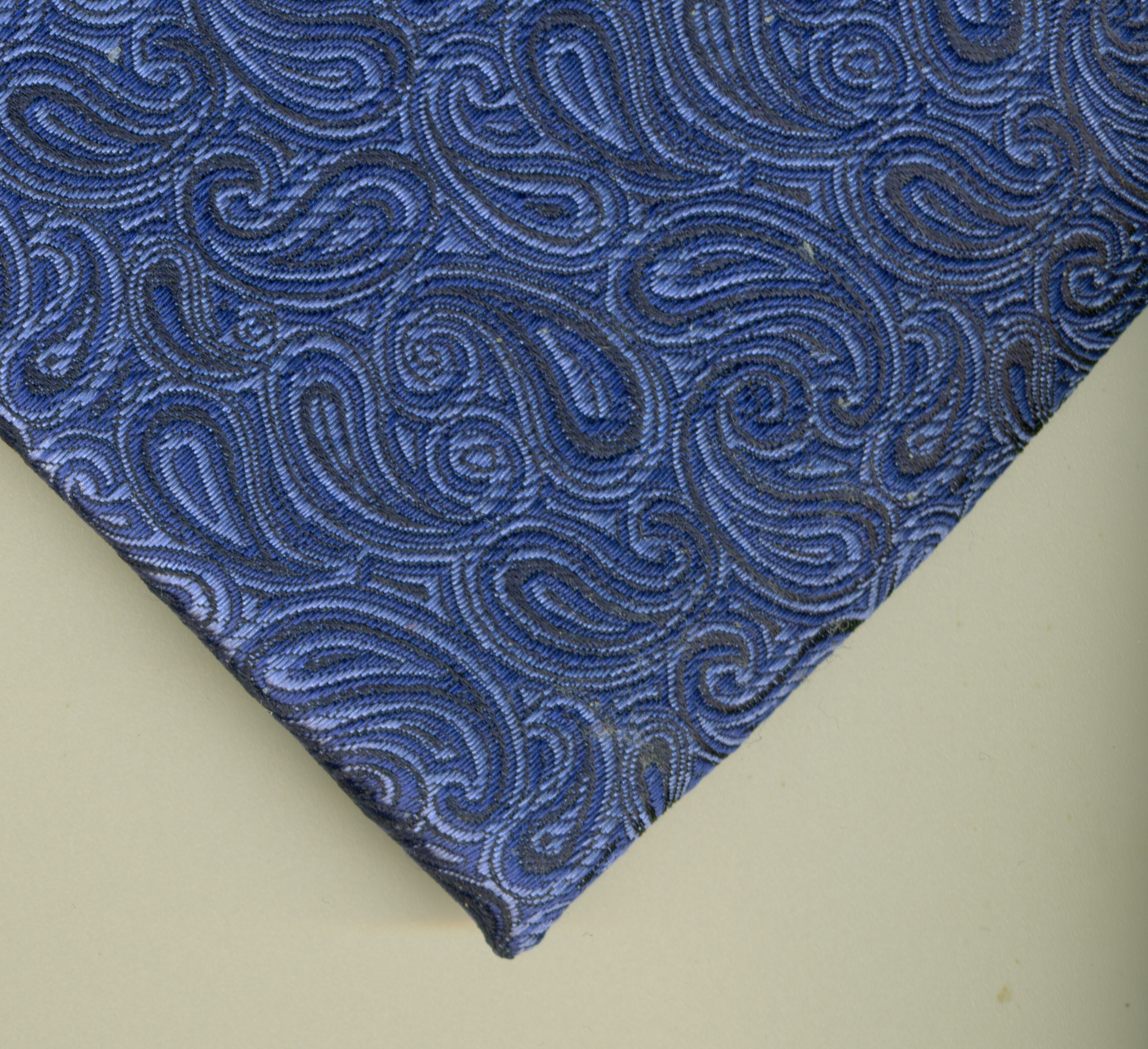 Spitze einer Krawatte, Paisleymuster blau, Seide